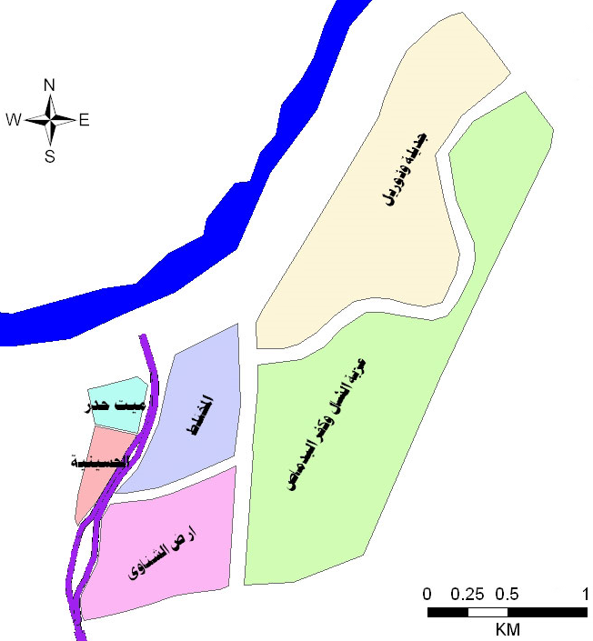 خريطة حي شرق المنصورة، محافظة الدقهلية، مصر